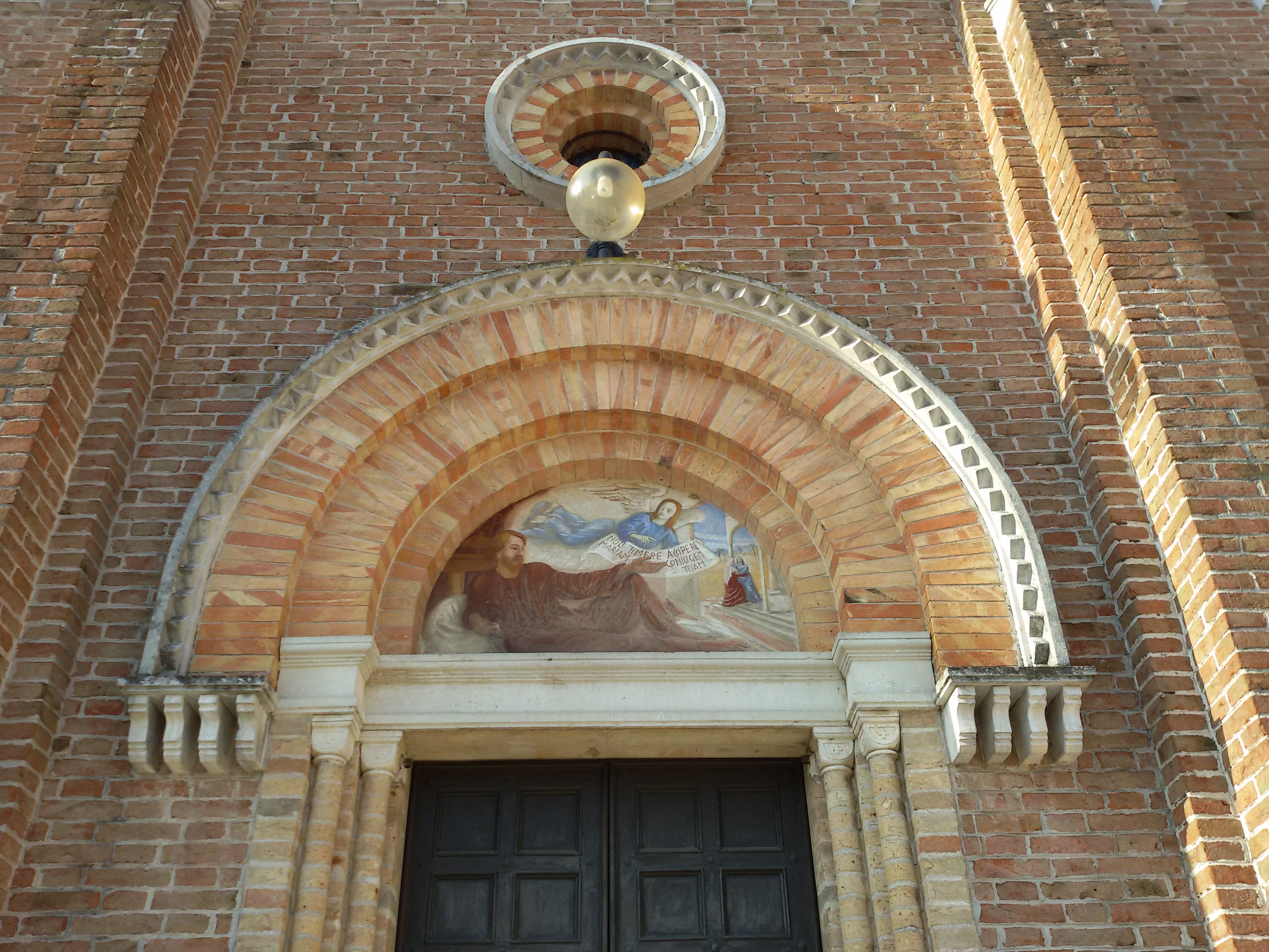 Chiesa di Santa Cristina Quinto di Treviso